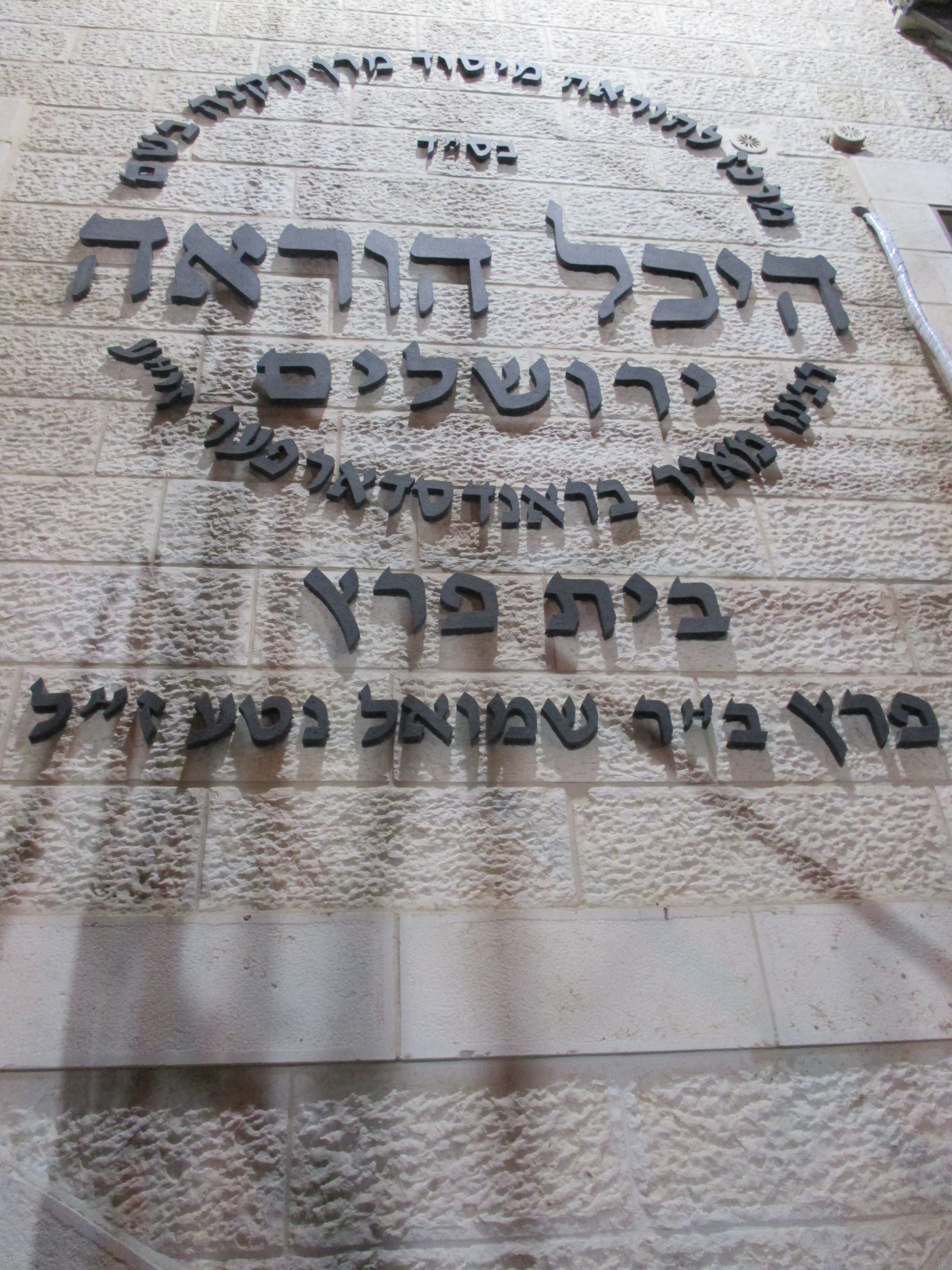 בית ההוראה "היכל הוראה" בשכונת מאה שערים.